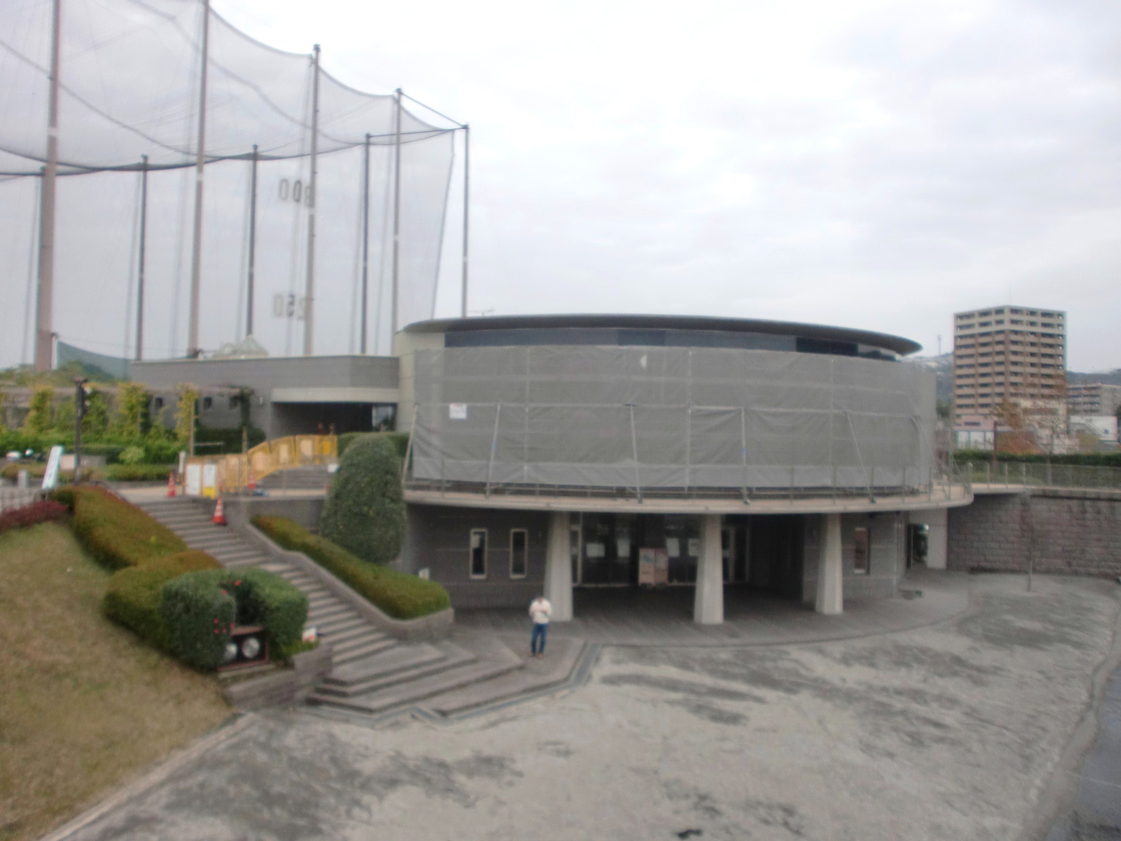 石橋記念公園内にある石橋記念館。